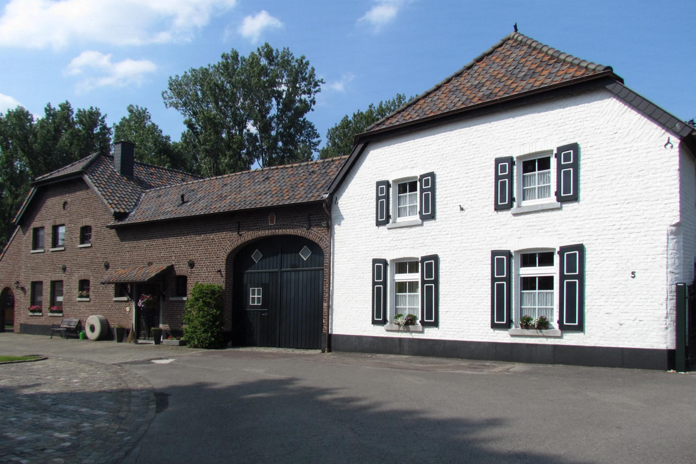 Straßenseite der Wehrer Mühle in Selfkant-Wehr